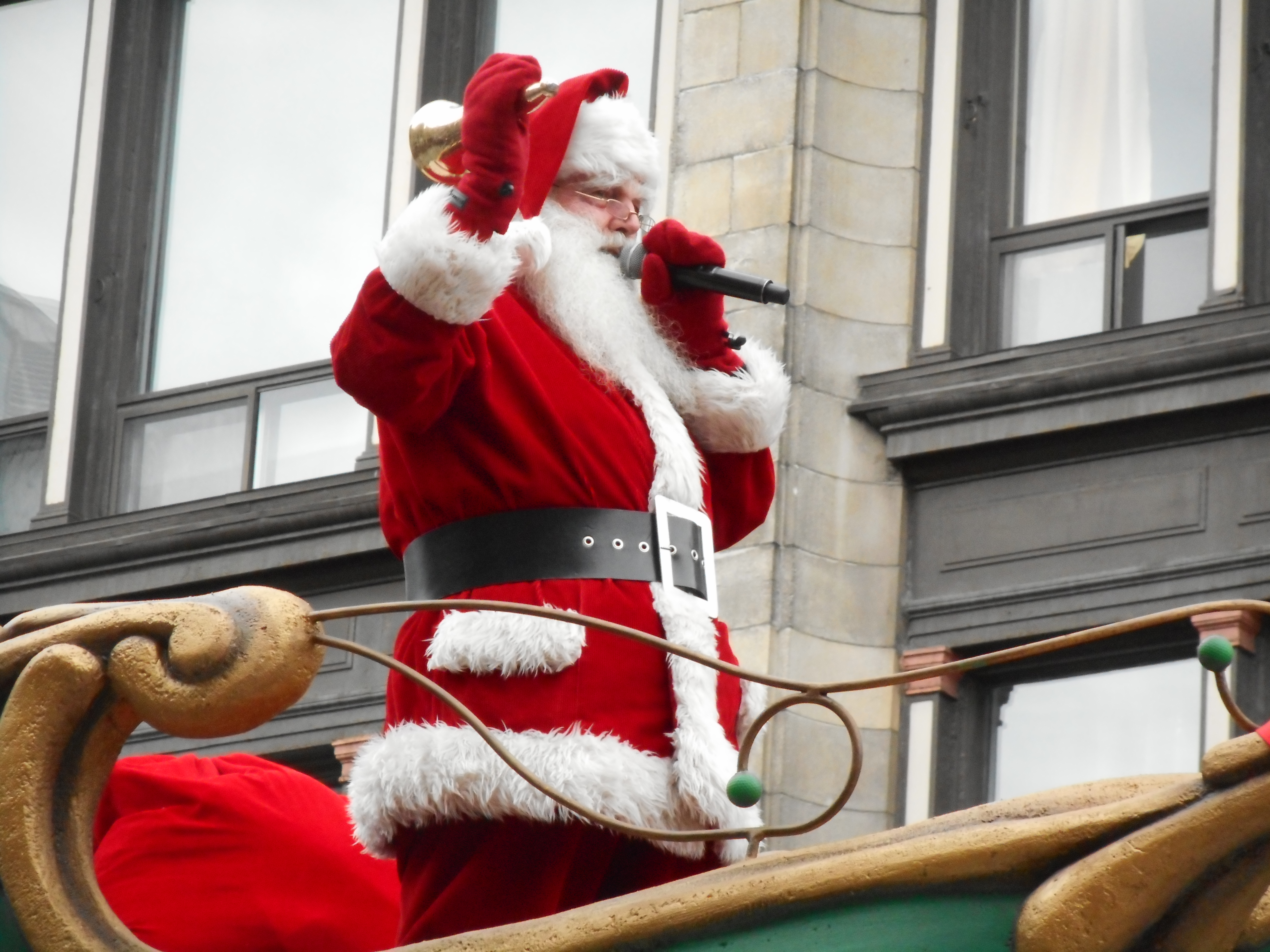 Défilé du Père Noël, rue Sainte-Catherine Ouest, Montréal